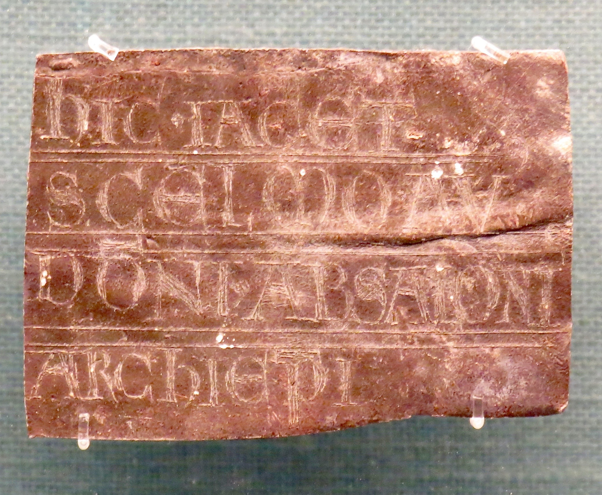 Blyplade fundet i Sorø Klosterkirke med indskrift om, at Absalons bedstefar Skjalm ligger her: HIC IACET SCELMO AV DONI ABSALONI ARCHIEPI. Nationalmuseet i København